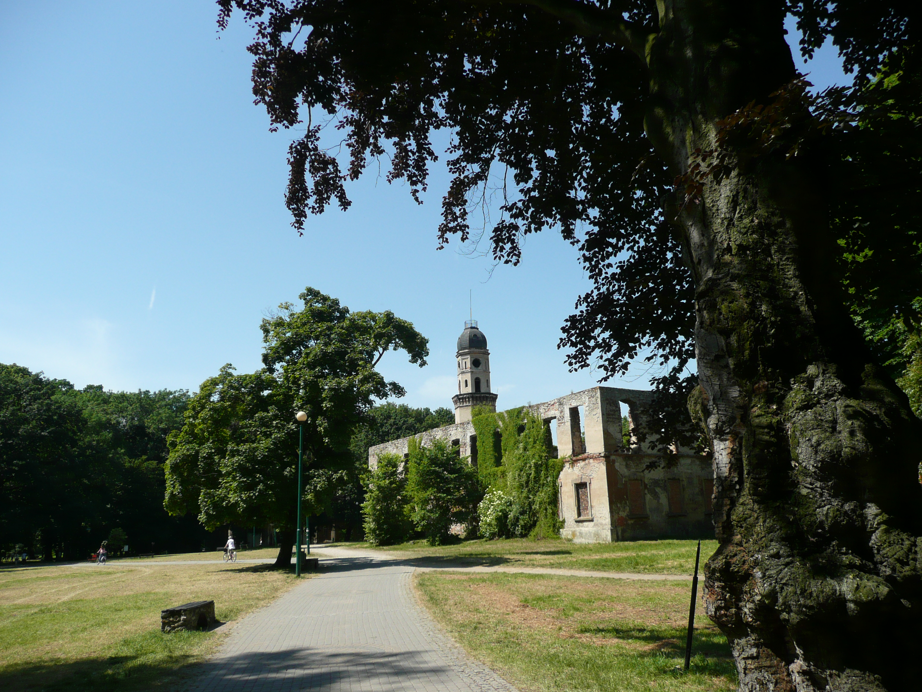 Zamek w Strzelcach Opolskich